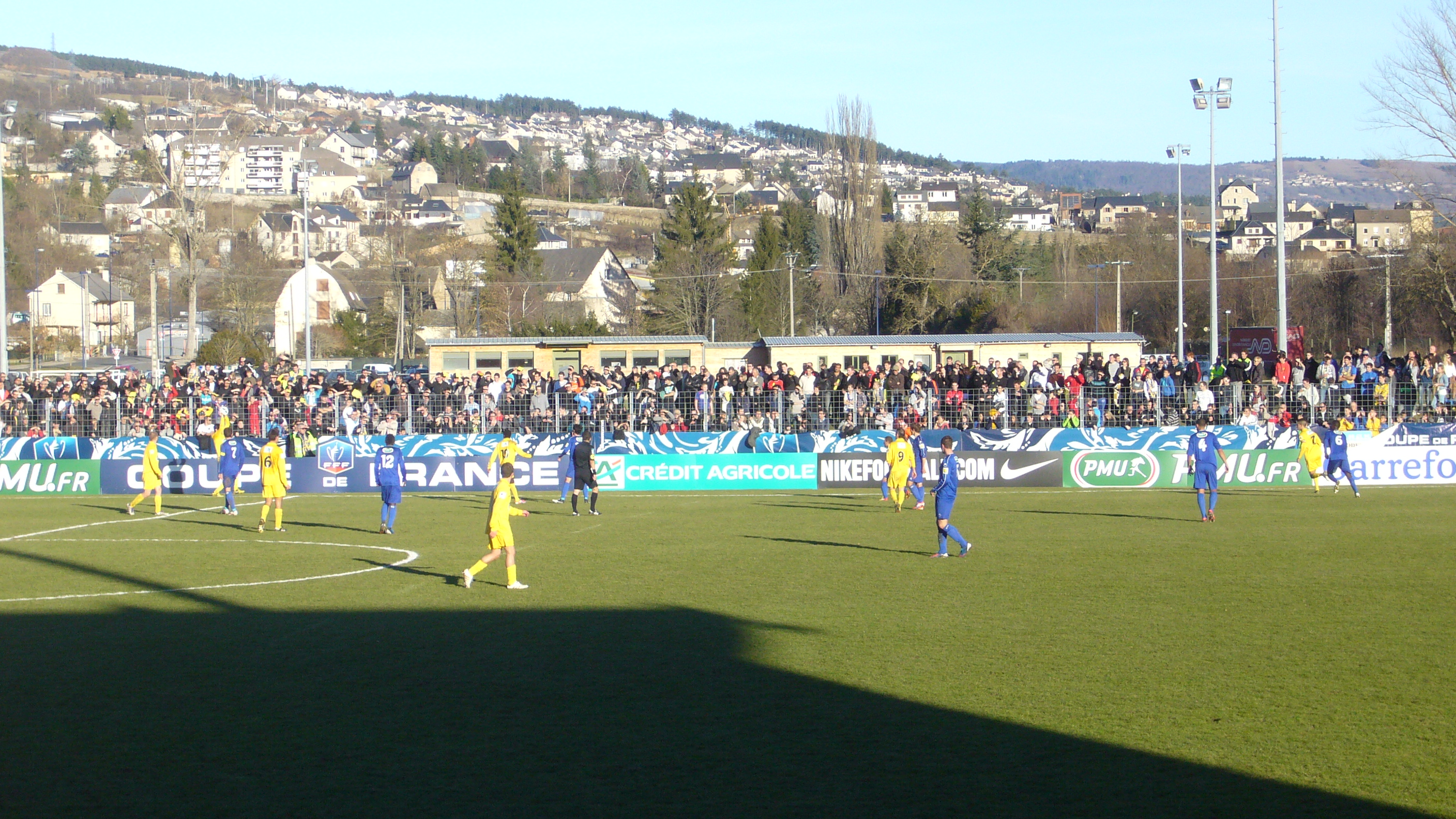 Scène de match durant le 32e de finales de la coupe de France de Football 2013, rencontre opposant l'Avenir Foot Lozère à l'AC Arles-Avignon